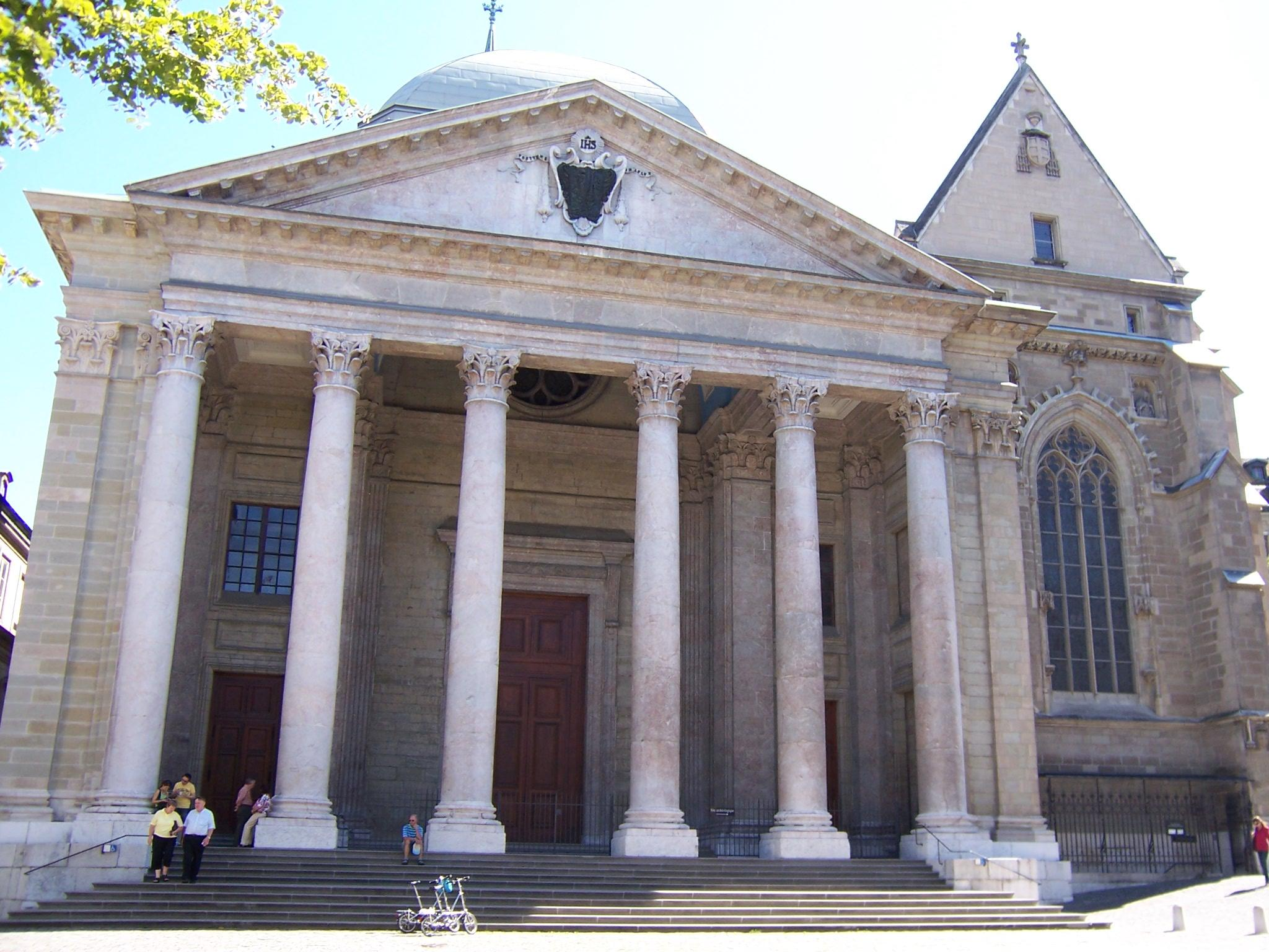 Klassizistisches Portal der Kathedrale St. Peter in Genf / Genève (Schweiz) eigene Aufnahme vom 3. September 2006